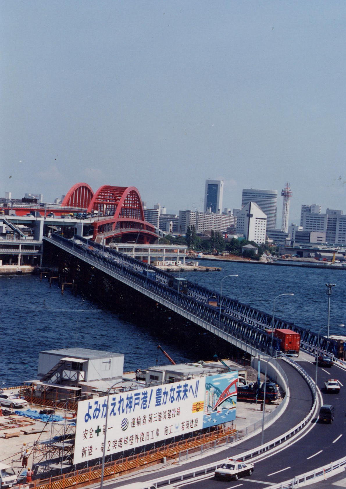 神戸大橋（撮影日不明）